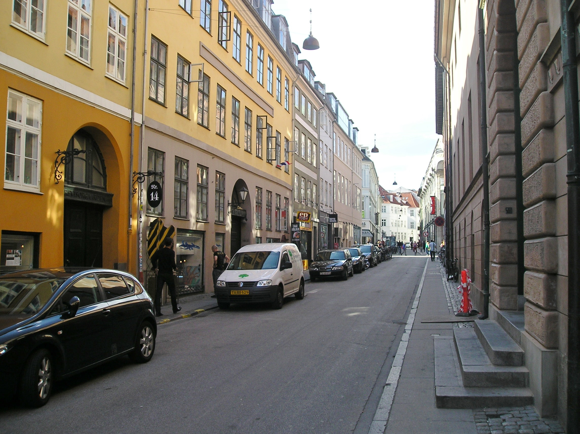 The street Kattesundet in Copenhagen.